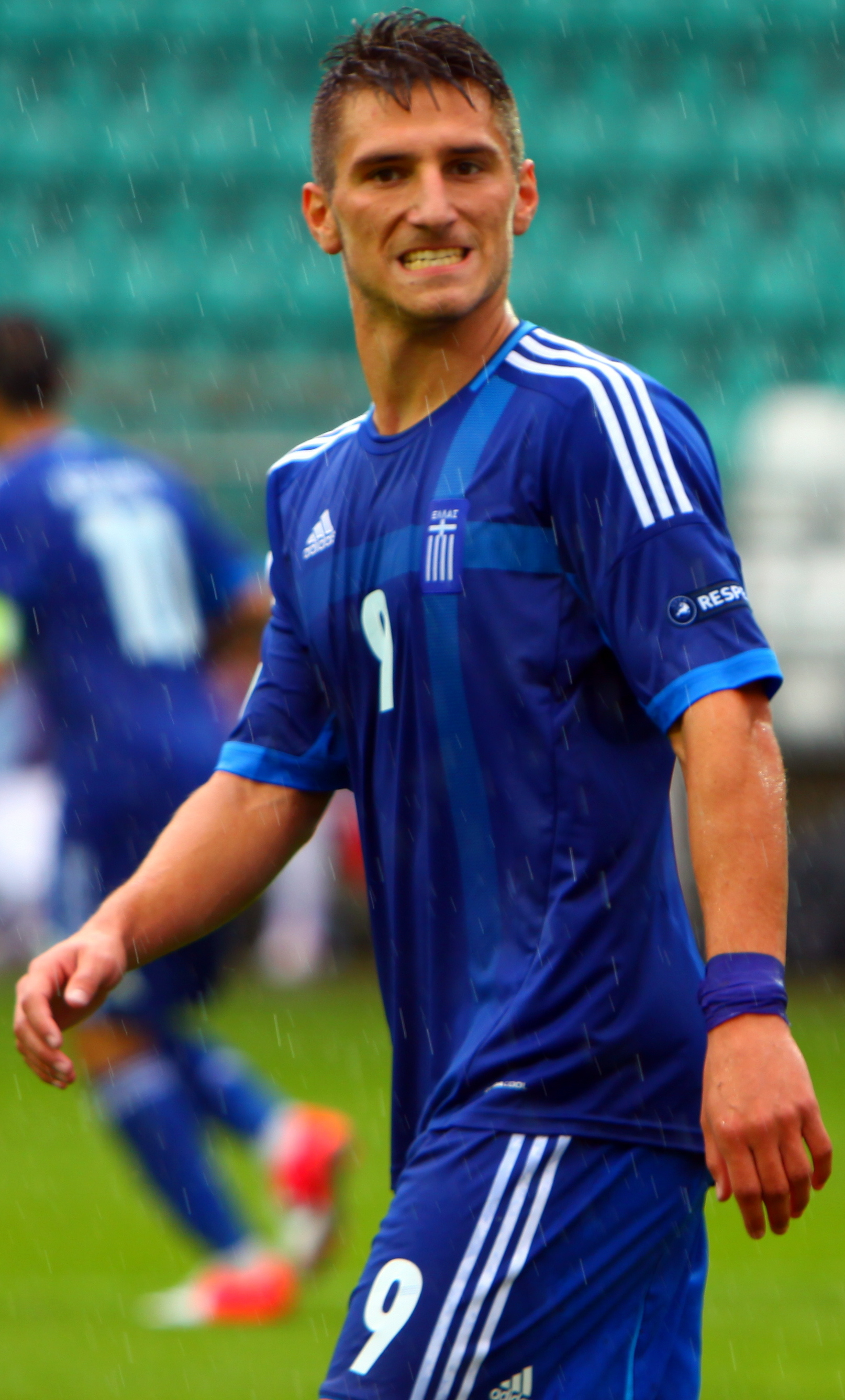 Dimitrios Diamantákos en 2012